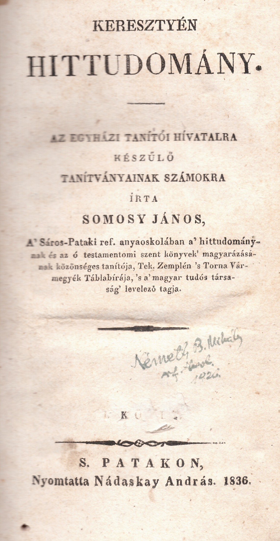 Somosy János (1783-1855): Keresztyén hittudomány (1836)